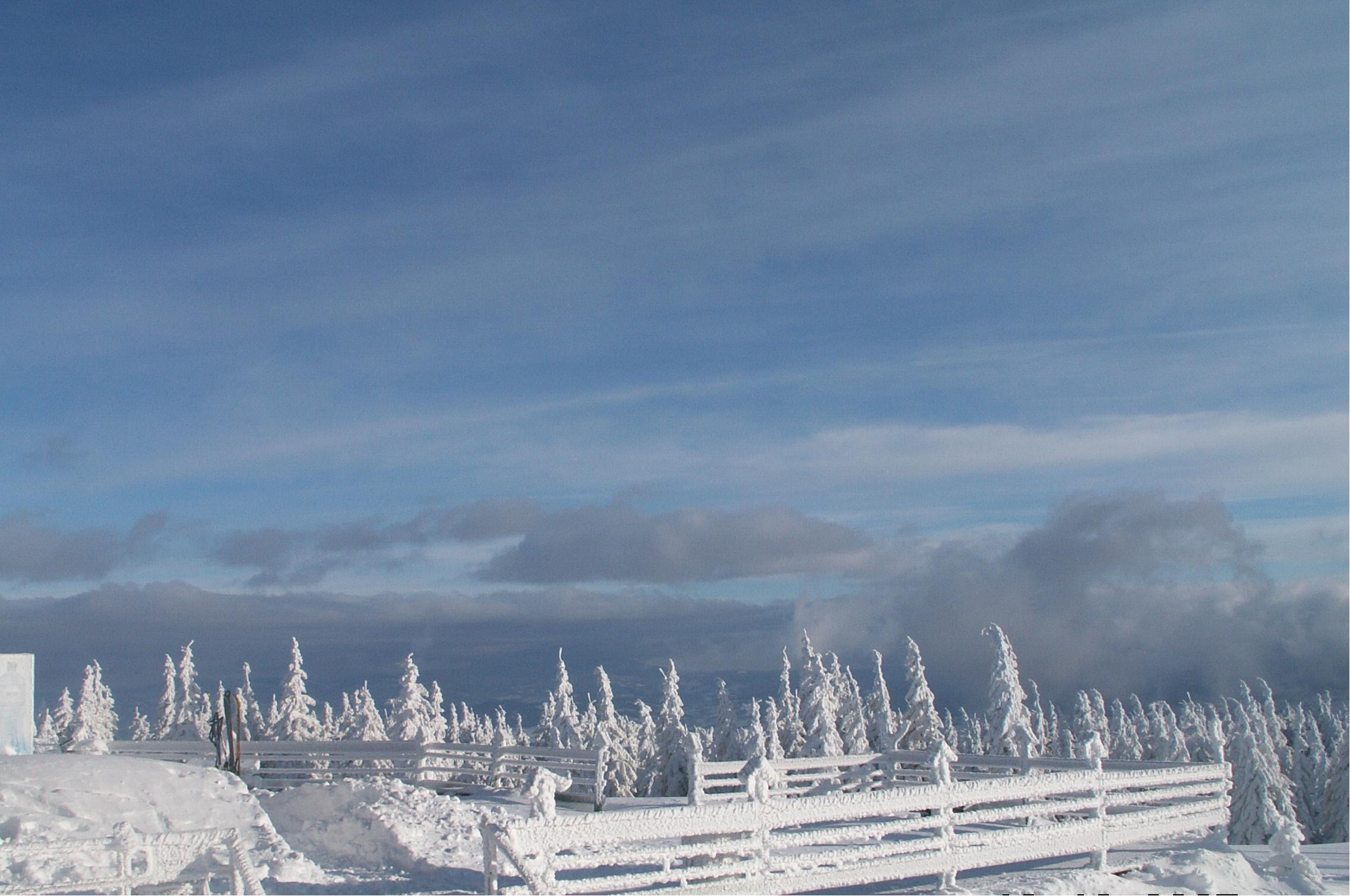 Skrzyczne